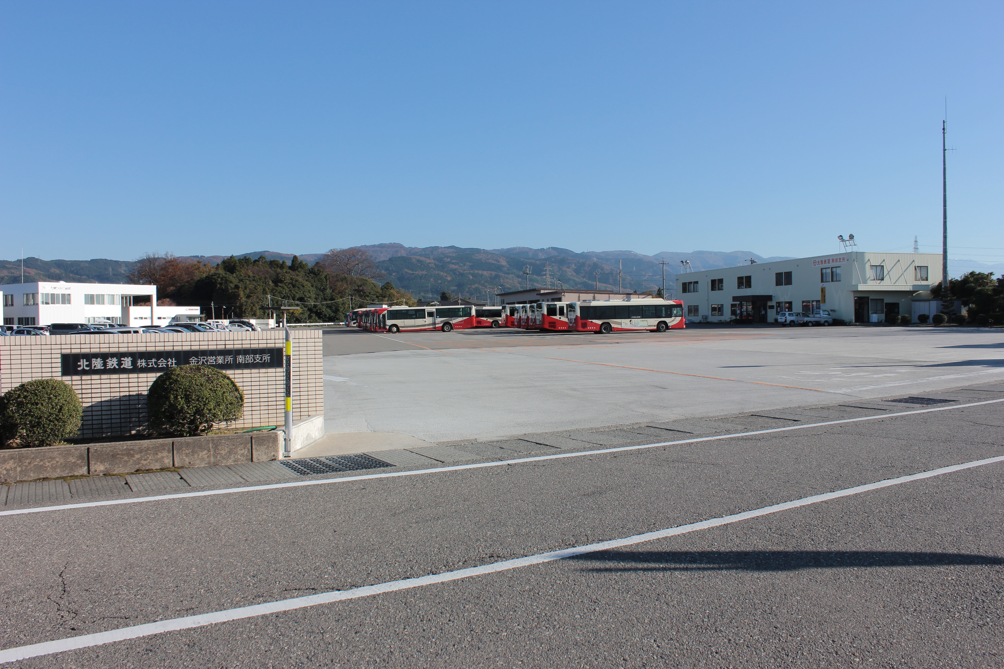 北陸鉄道金沢営業所南部支所（石川県白山市）、加賀白山バスならびに北陸交通の本社も敷地内に置かれている。 Canon EOS Kiss X5